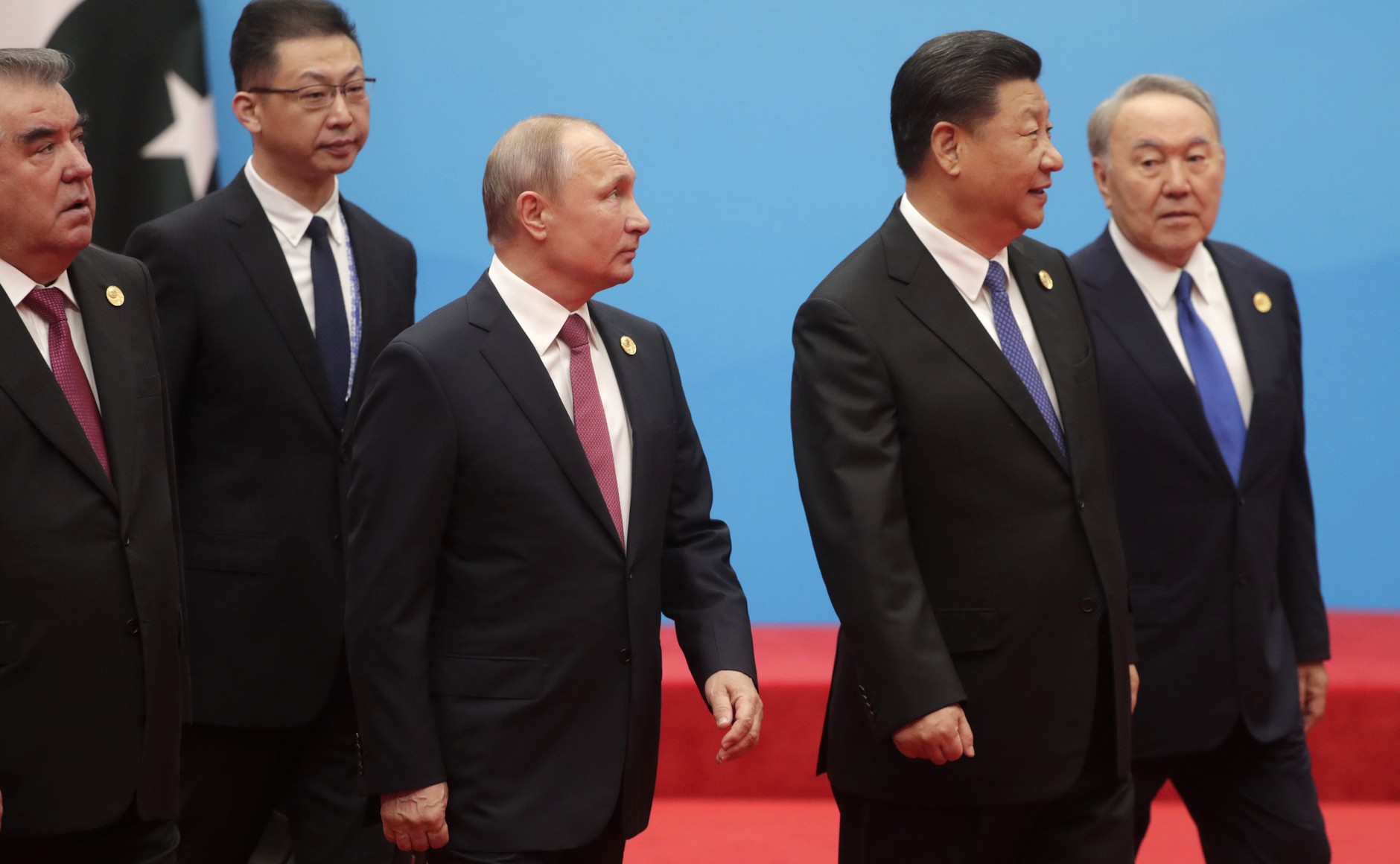 Участники саммита Шанхайской организации сотрудничества